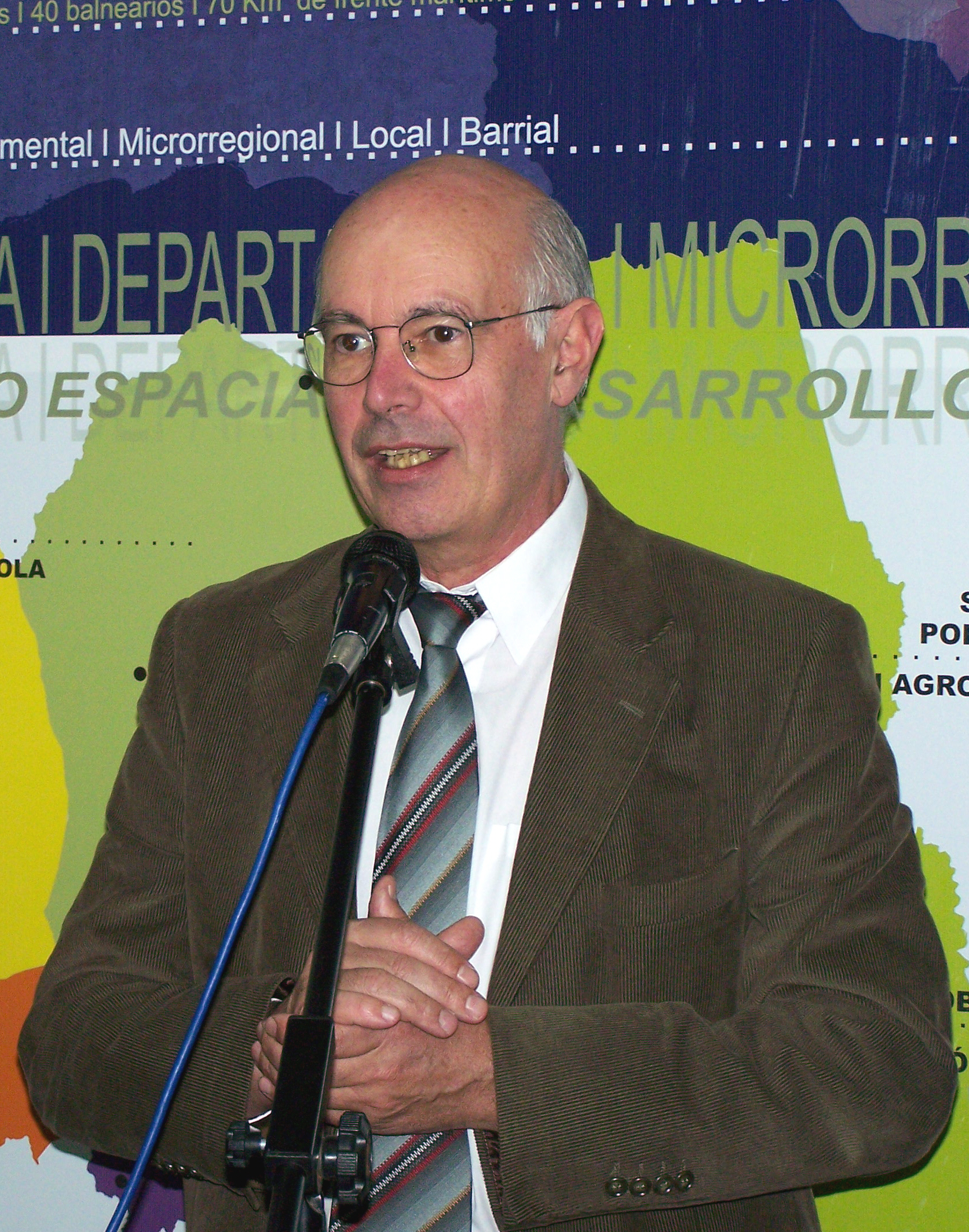 Fotografía de Enrique Rubio, profesor y político uruguayo.